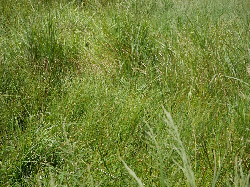 Eleocharis wichurae：シカクイ 2018/09/10 和歌山県：Wakayama Pref. Japan